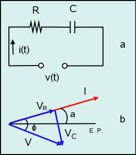 Circuito serie RC (RC serial circuit)